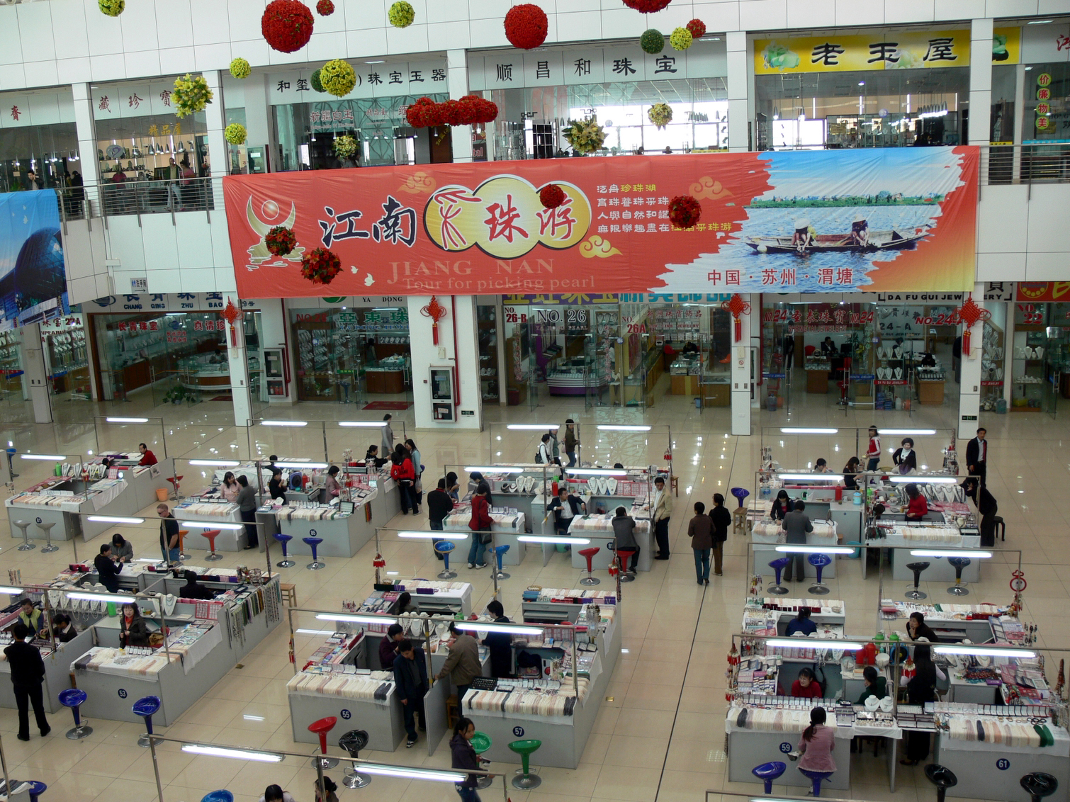 China PEARLS AND GEMS CITY, Weitang,Suzhou苏州渭塘镇中国珍珠城